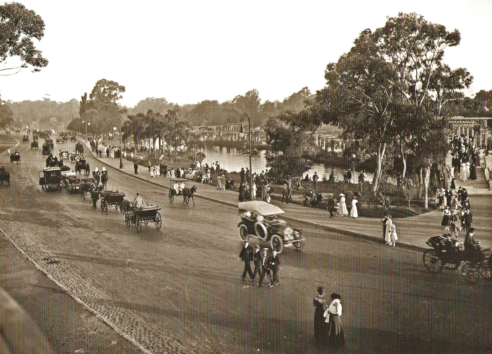 Fotografía (ca. 1916) de la colección de la Dirección Municipal de Paseos de Buenos. Se puede ver la Avenida de los Lagos (hoy Infanta Isabel) y El Rosedal. (A la derecha puede verse el puente peatonal). Barrio de Palermo, Buenos Aires, Argentina.